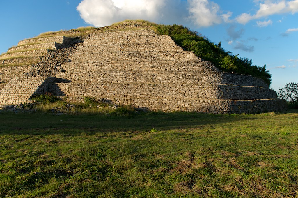 Plataforma superior de la pirámide Kinich Kakmó en Izamal, Yucatán, México